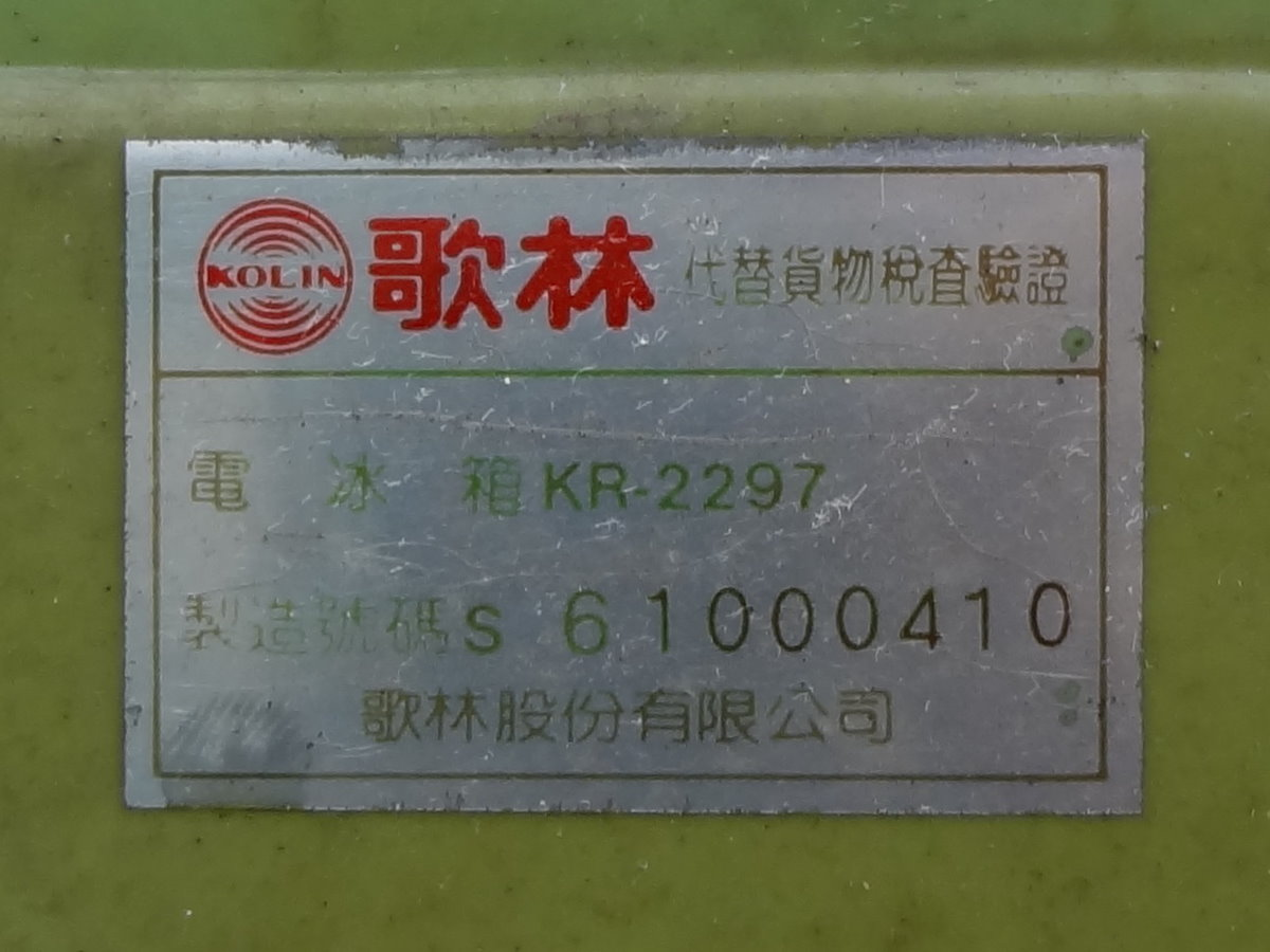 歌林電冰箱KR-2297製造號碼標籤，代替貨物稅查驗證。